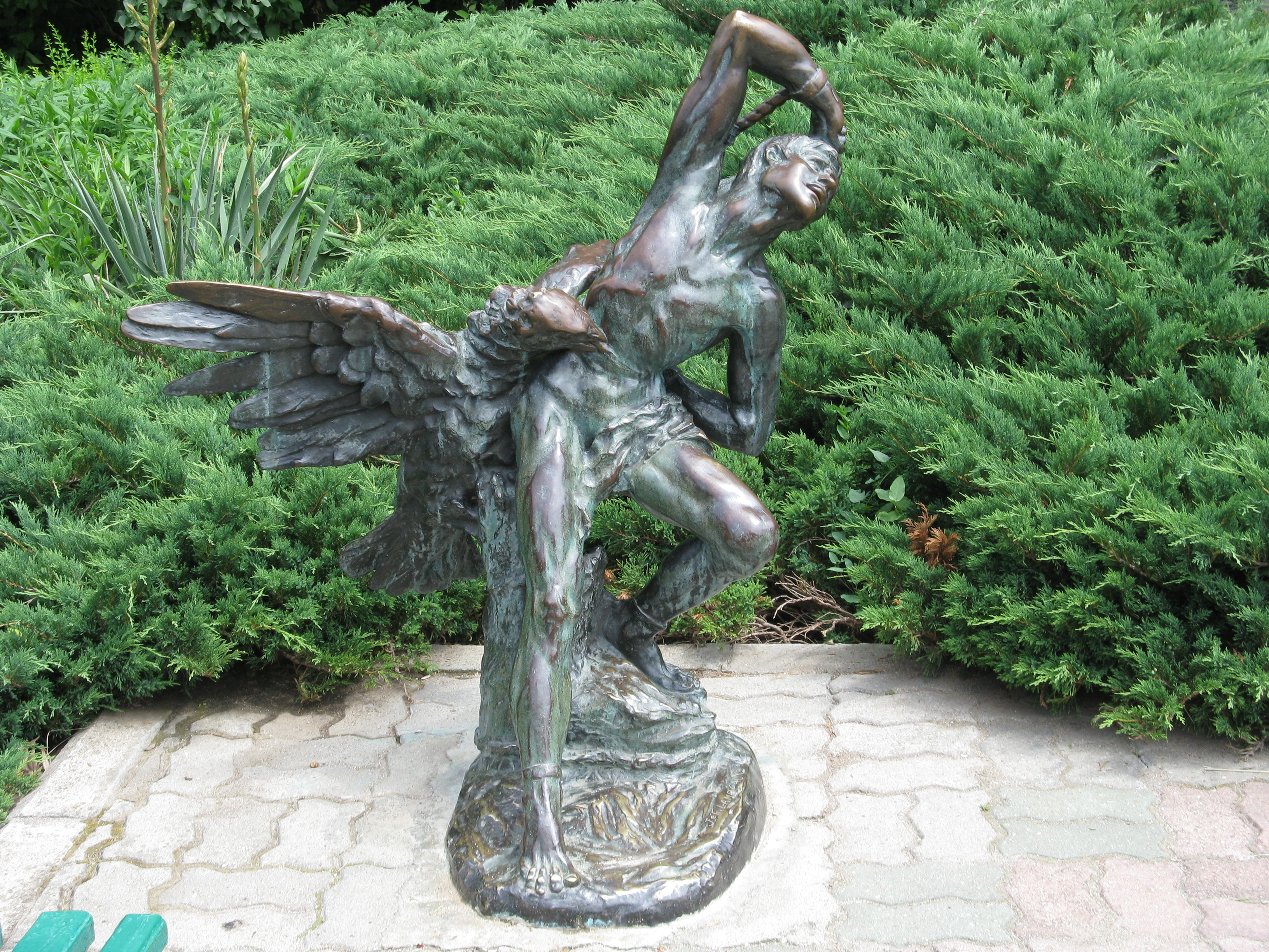 פסל של פרומטאוס כשהנשר מנקר בכבדו בגן חרסטראו בבוקרשט